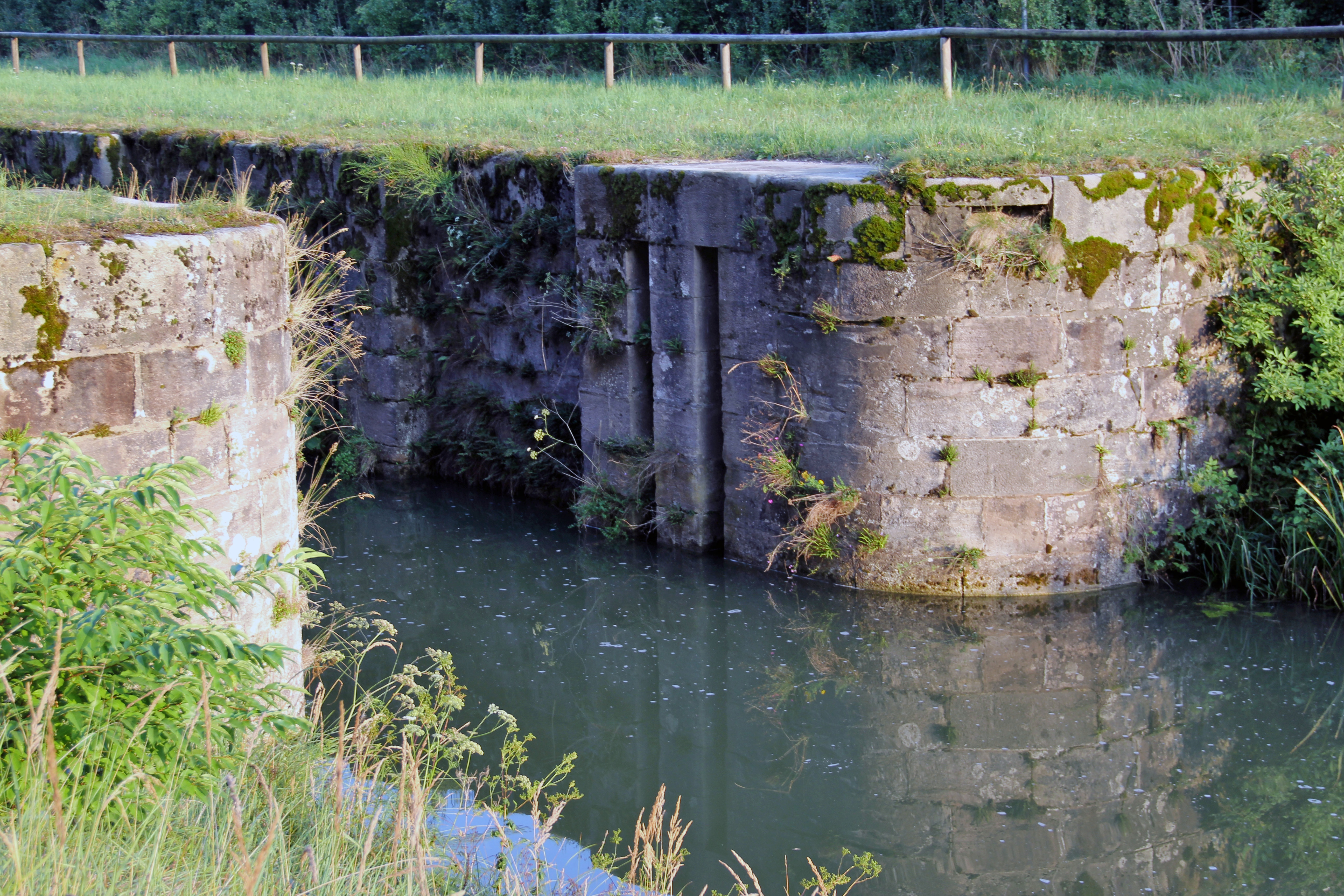 Schleuse 53, Ludwig-Donau-Main-Kanal